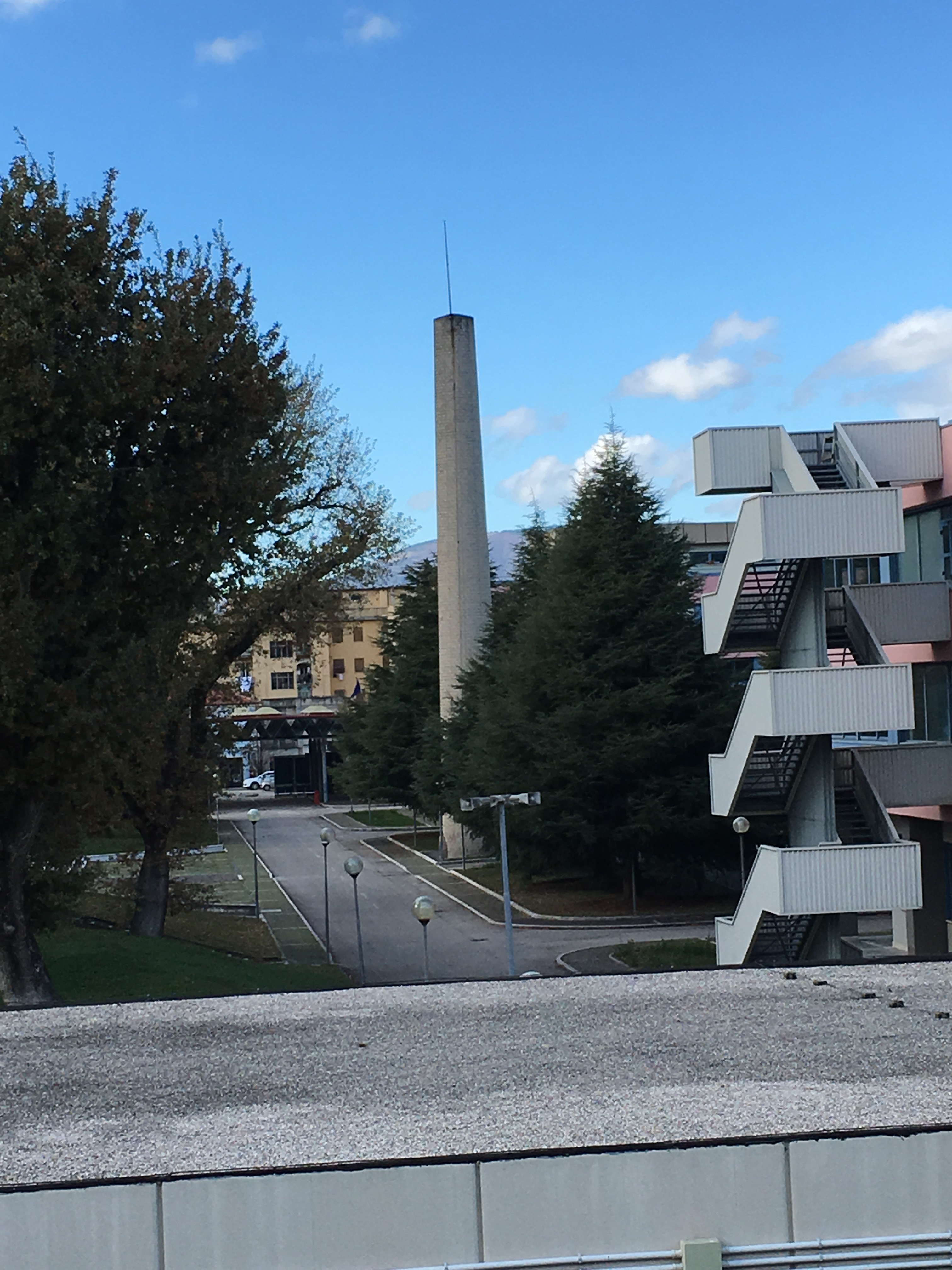 Ciminiera del Cotonificio di Spoleto, preservata all'interno della Scuola di Polizia.